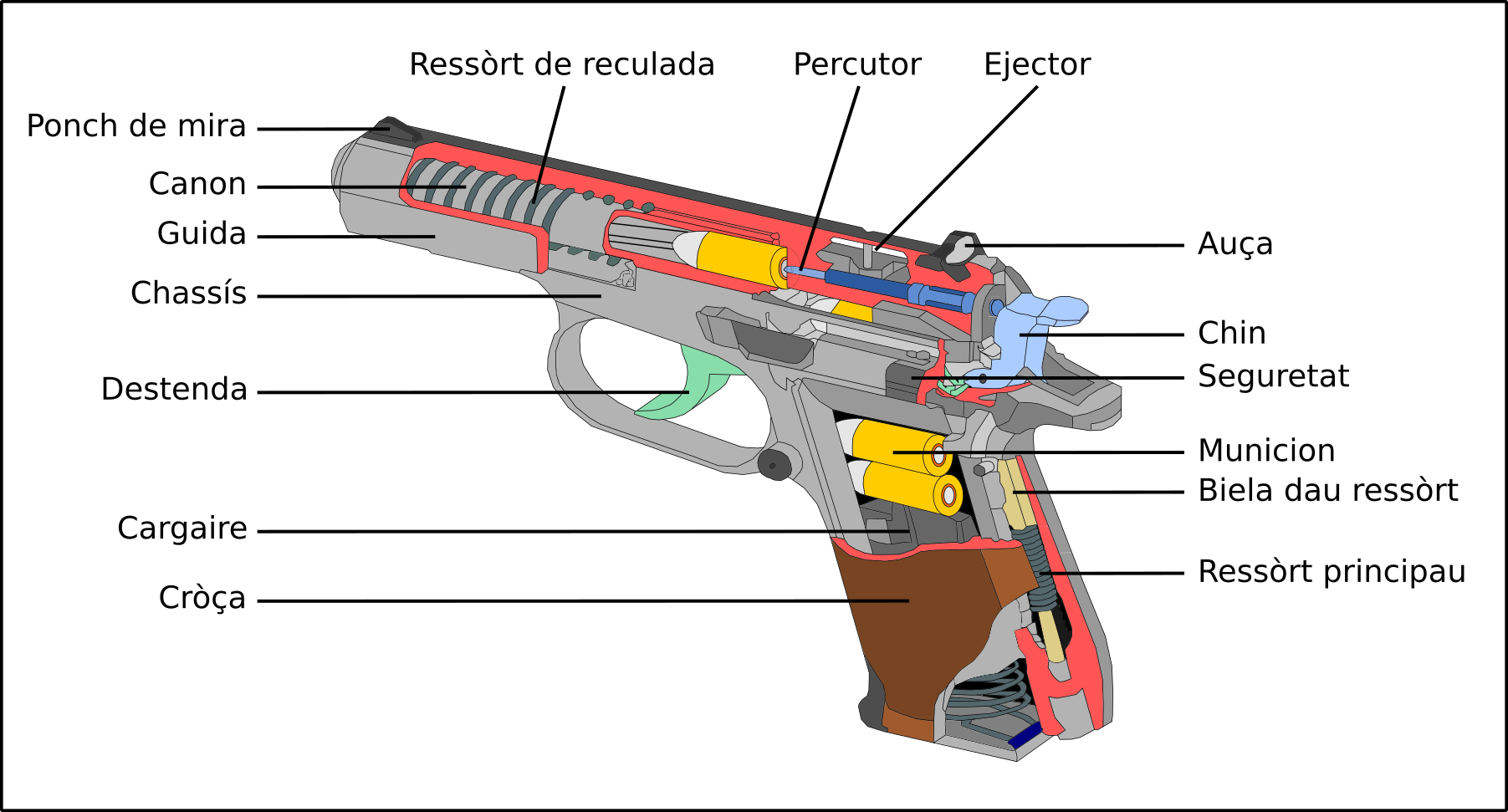 Esquèma generau d'un pistolet.